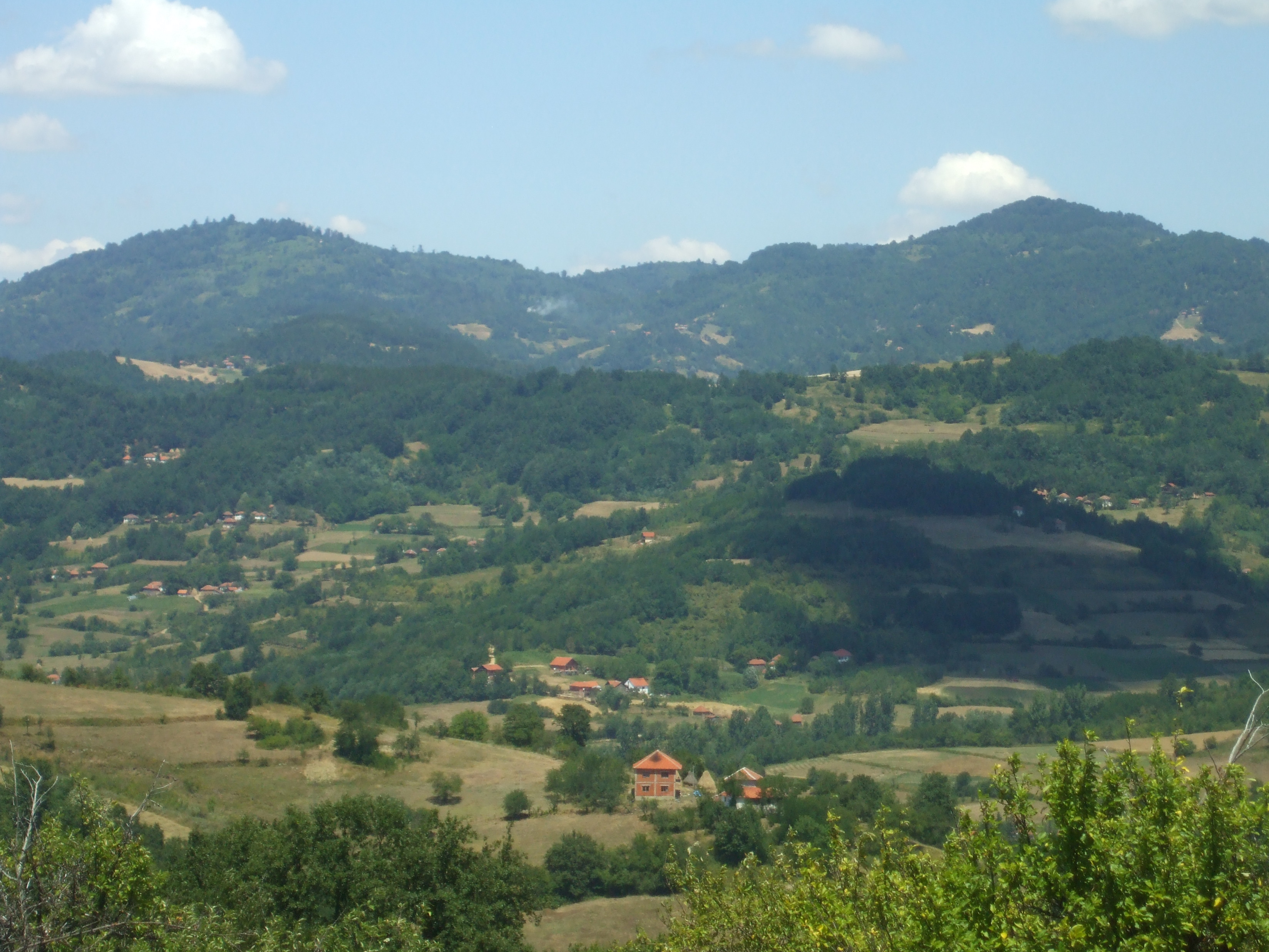 Кукавица, поглед ка североистоку. У првом плану је Големо Село и то редом махале: Баљковац, Варожег и Дубје. У даљини се назире Мијаковце (десно) и Студена (лево). На хоризонту је Лисац, један од врхова Кукавице. Снимио Драгољуб.